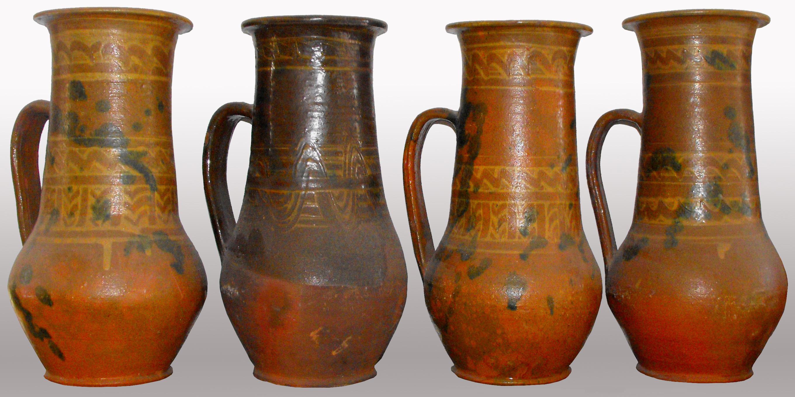 Ritka formájú, 20. századi gorzafalvi tejesköcsögök Moldvából (Románia)